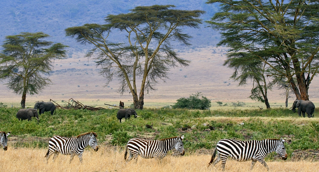 Zebras (Equus quagga bohemi), Serengeti savana plains, Tanzania Place: NgoroNgoro Crater, Tanzania, Africa